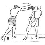 direct5.jpg